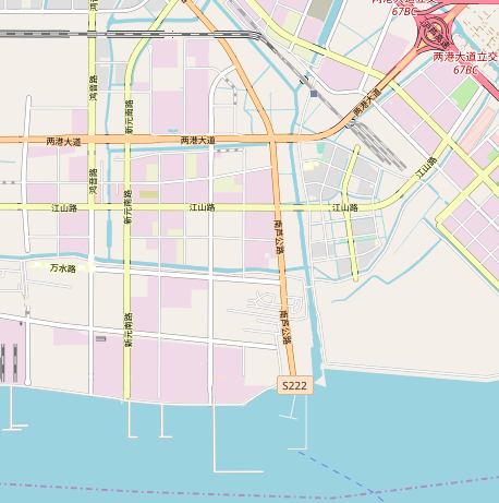 芦潮港地图